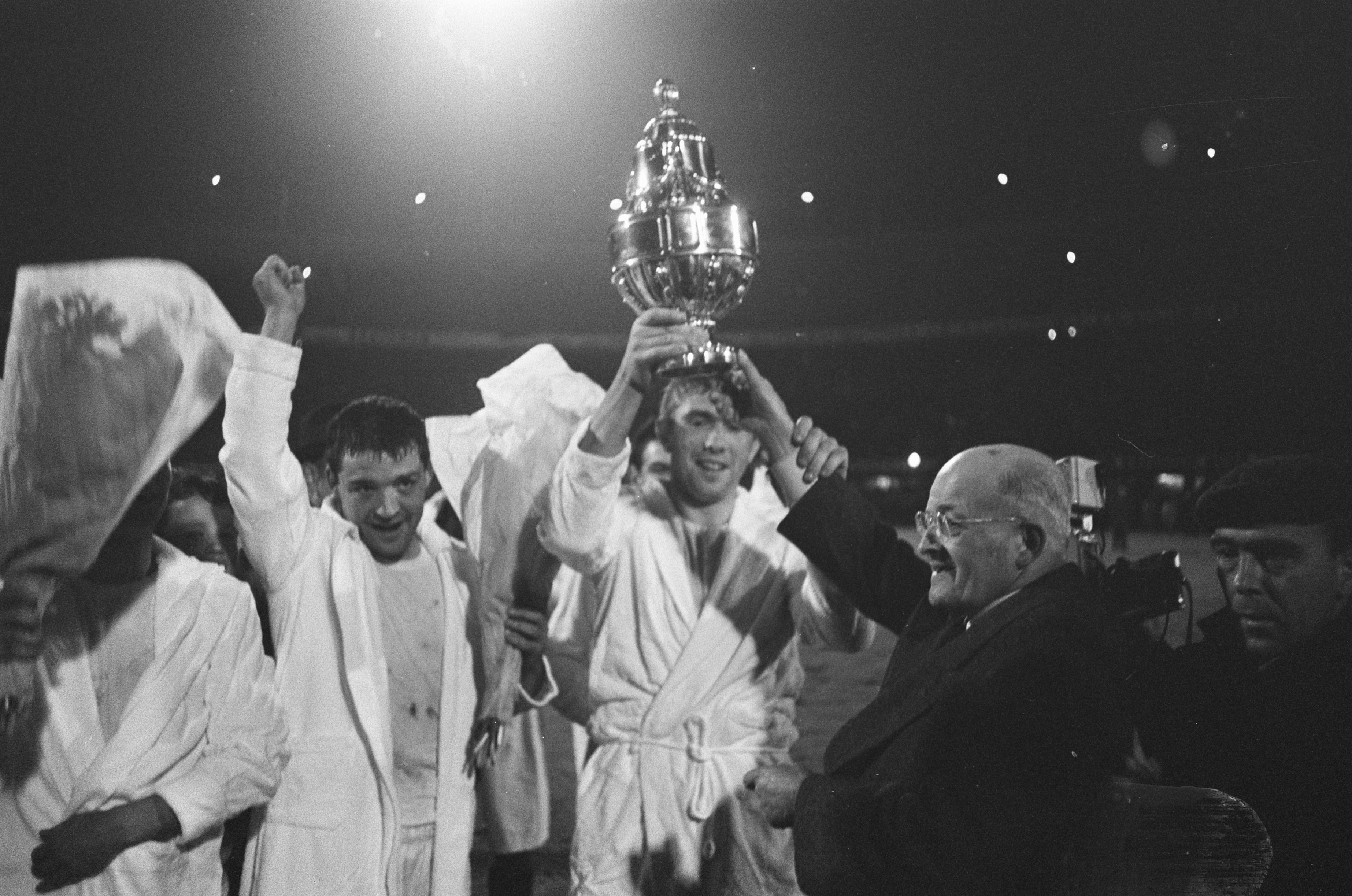 Collectie / Archief : Fotocollectie Anefo Reportage / Serie : [ onbekend ] Beschrijving : Bekerfinale Sparta tegen ADO 1-0, aanvoerder Eykenbroek met beker Datum : 25 mei 1966 Trefwoorden : Bekerfinales, aanvoerders, sport, voetbal Persoonsnaam : Eykenbroek Instellingsnaam : ADO, Sparta Fotograaf : Koch, Eric / Anefo Auteursrechthebbende : Nationaal Archief Materiaalsoort : Negatief (zwart/wit) Nummer archiefinventaris : bekijk toegang 2.24.01.05 Bestanddeelnummer : 919-1930